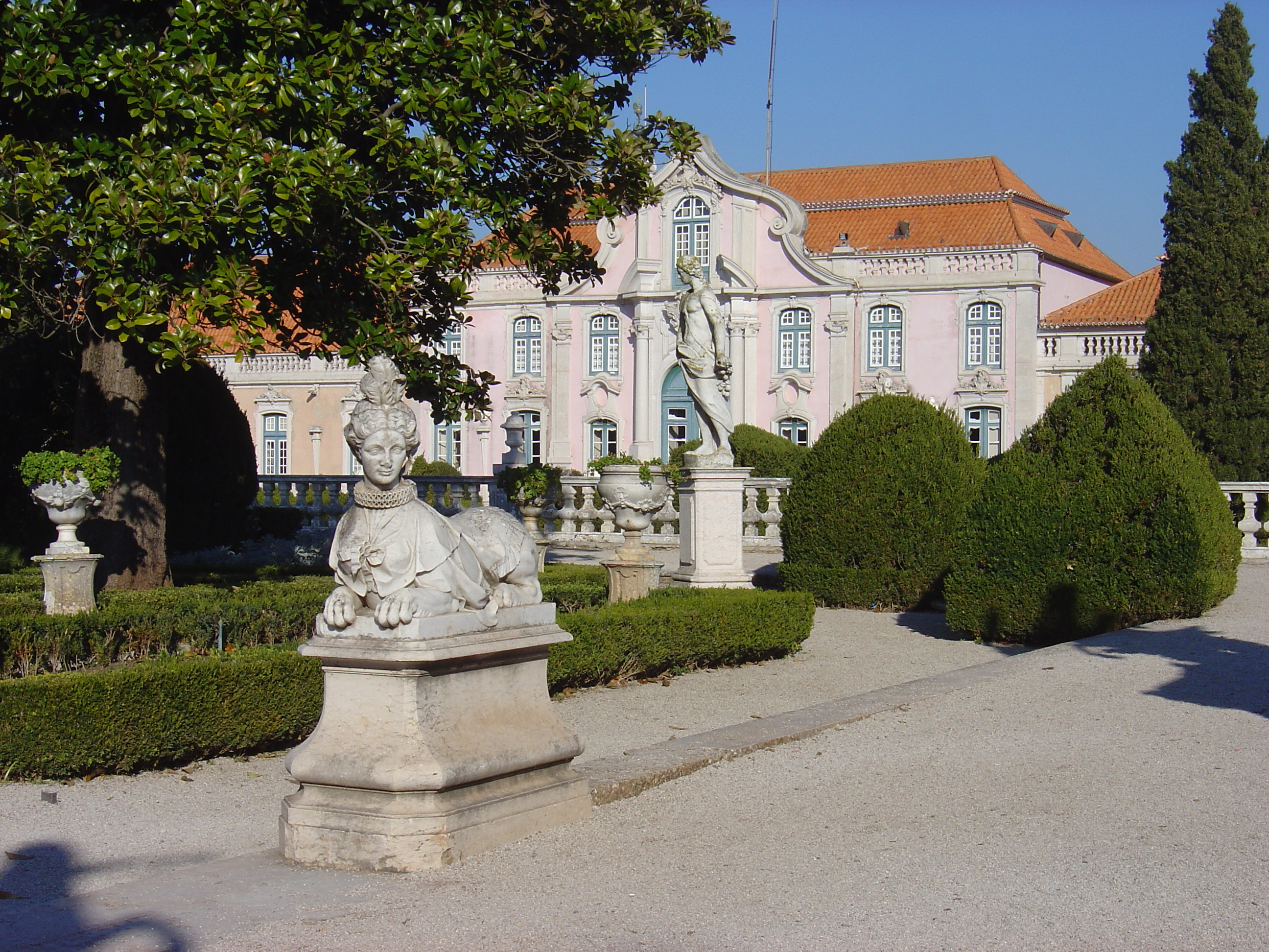 Queluz National Palace, Portugal